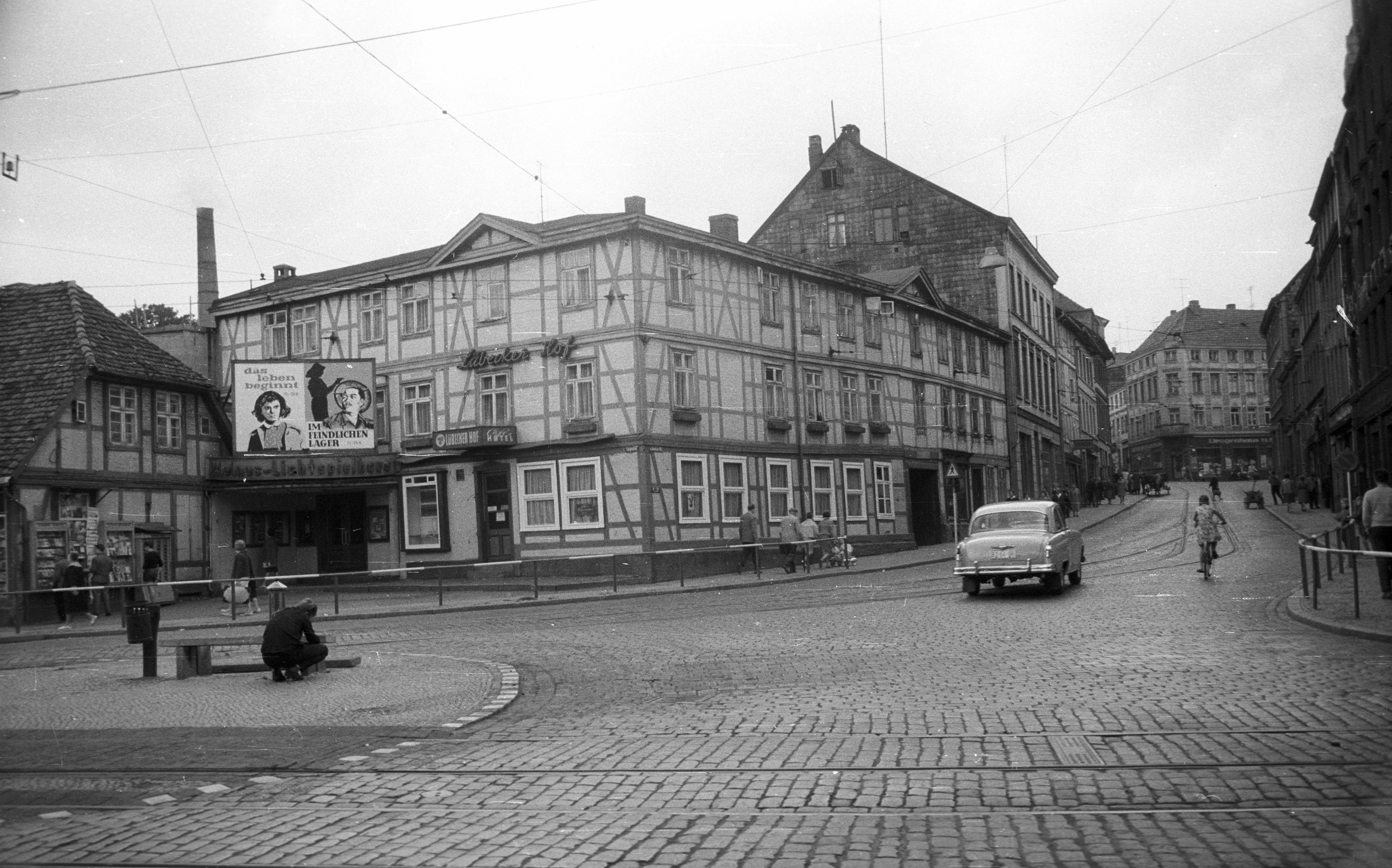 Marienplatz, középen a mára lebontott Lübecker Hof szálloda. Location: Germany Tags: poster, GDR Title: Marienplatz, középen a mára lebontott Lübecker Hof szálloda.